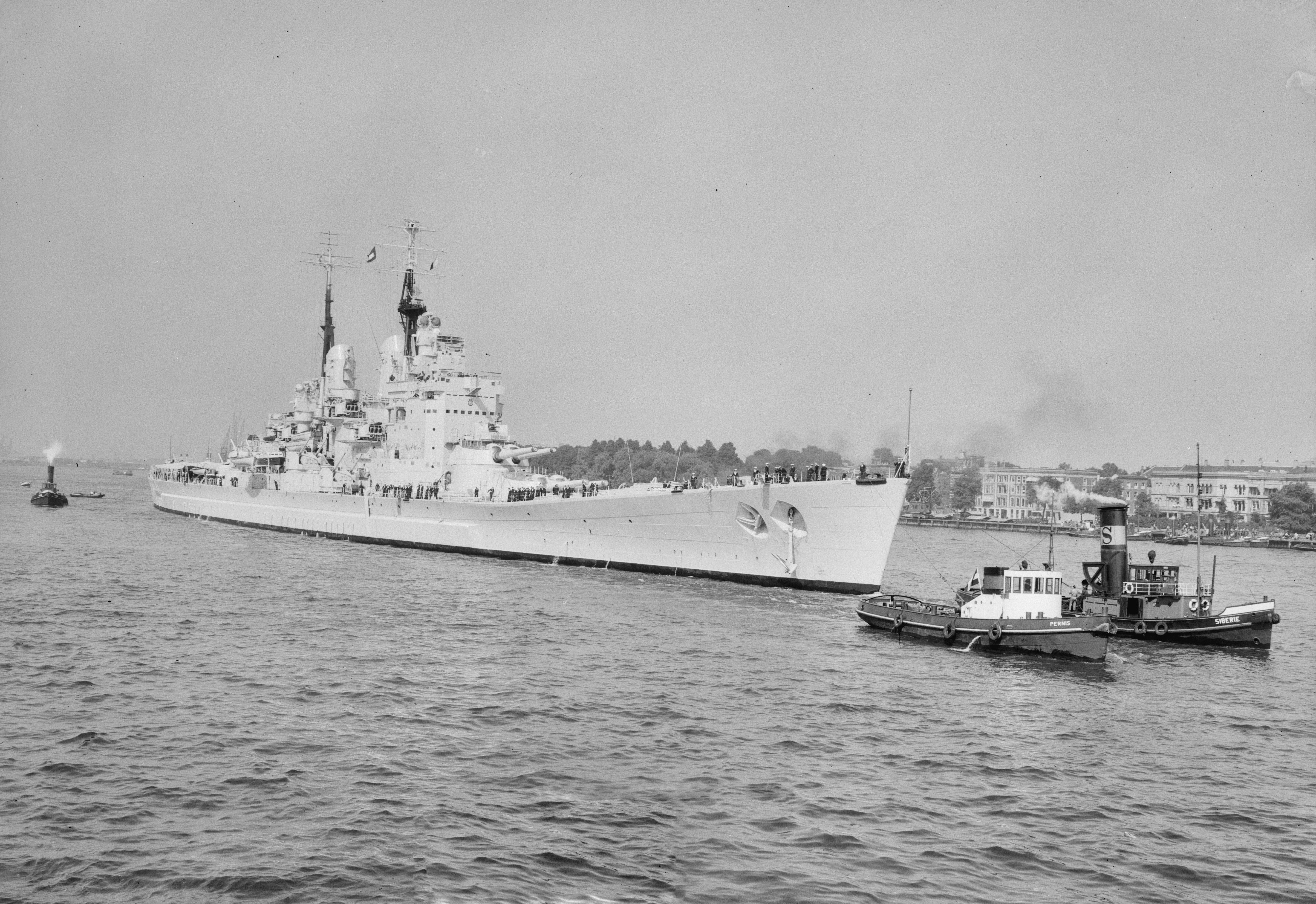 Collectie / Archief : Fotocollectie Anefo Reportage / Serie : [ onbekend ] Beschrijving : Brits slagschip "Vanguard" bezoekt Rotterdam Datum : 28 juni 1952 Locatie : Rotterdam, Zuid-Holland Trefwoorden : schepen Fotograaf : Consenheim, Wim / Anefo Auteursrechthebbende : Nationaal Archief Materiaalsoort : Negatief (zwart/wit) Nummer archiefinventaris : bekijk toegang 2.24.01.04 Bestanddeelnummer : 905-1896